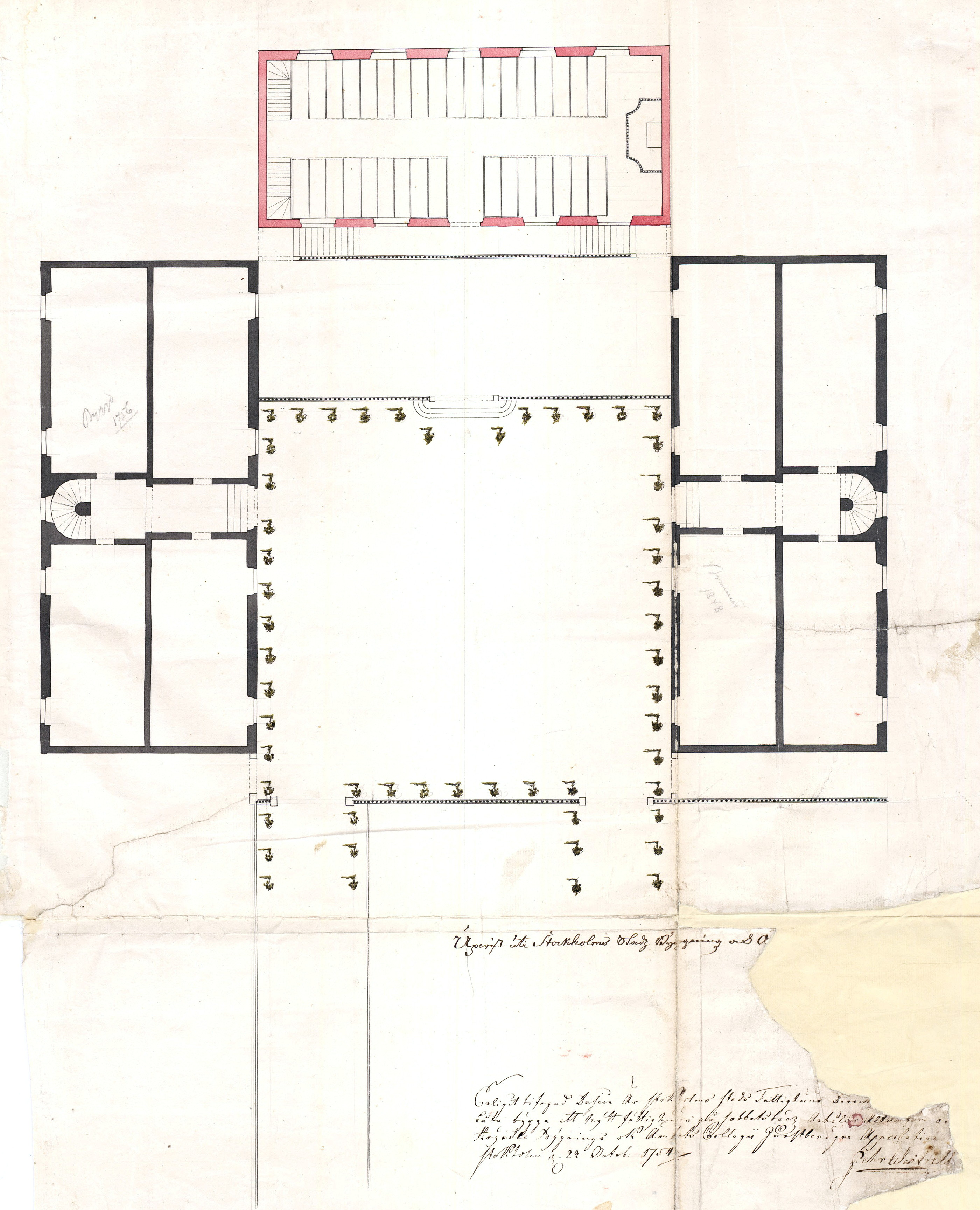 Ritning för nybyggnad av Stockholms stads fattighus på Sabbatsberg